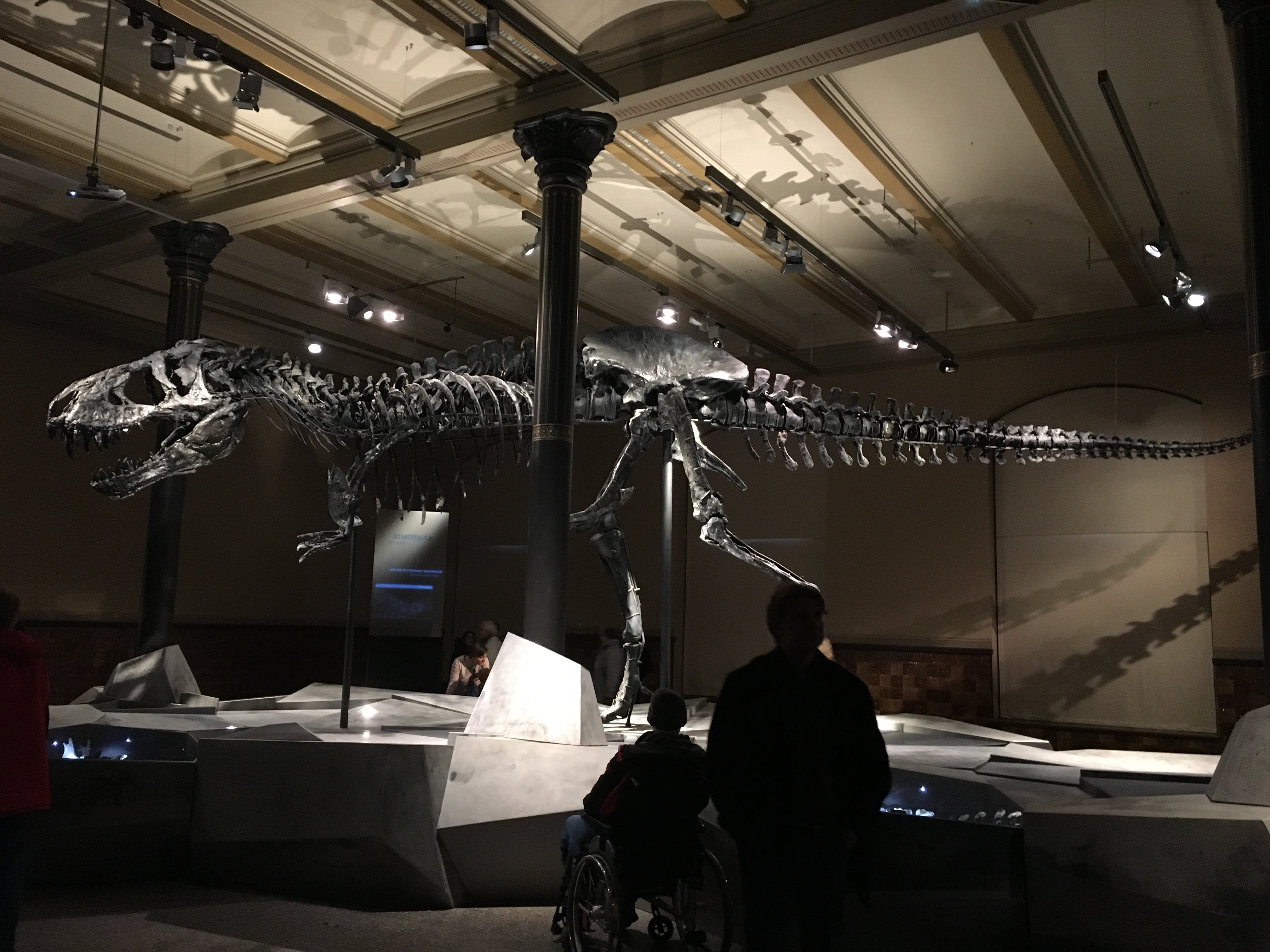 TRex "Tristan" NaKuMuseum 💕 Ostern 2016